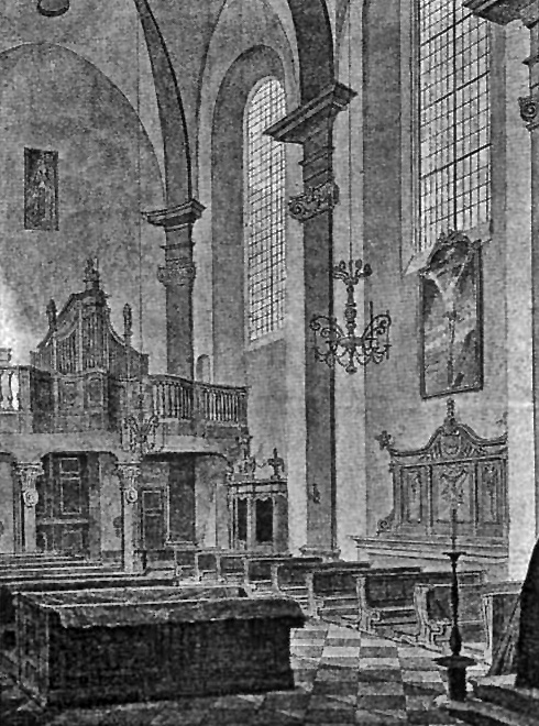 Sankt Gregorius im Elend Westansicht, Köln. Aquarell um 1840